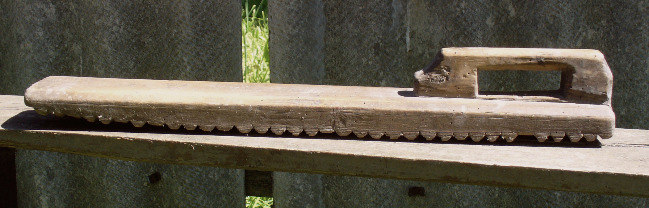 Рубель. Предмет домашнего быта, который в старину женщины использовали для глажения белья после стирки.